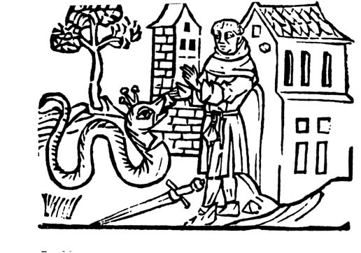 Reynke de vos Drittes Buch, das vierte Kapitel Inkunabel, gedruckt 1498 in Lübeck Herzog August Bibliothek, Wolfenbüttel